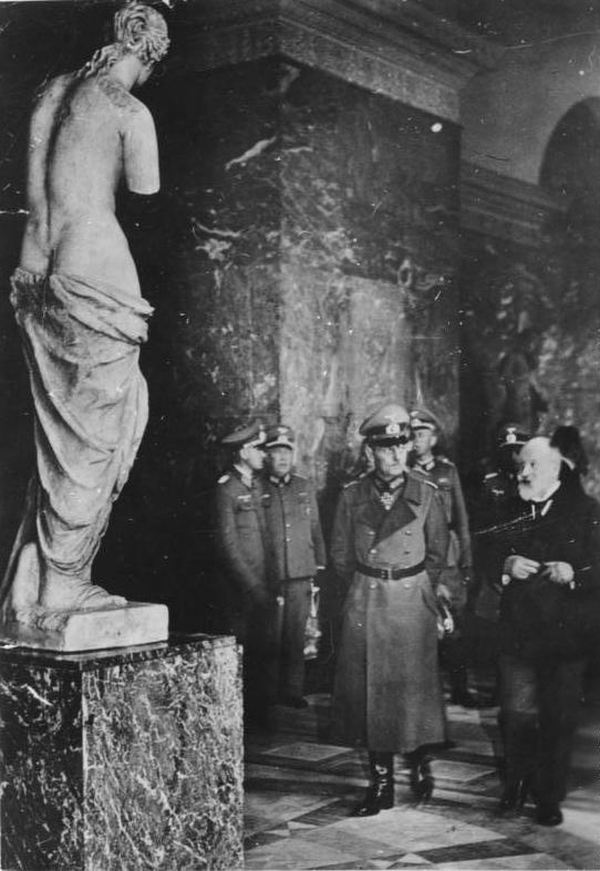 Paris, Besuch Gerd v. Rundstedt im Louvre ADN/ZB II. Weltkrieg 1939 - 1945. Frankreich. Generalfeldmarschall v. Rundstedt und weitere Angehörige der faschistischen deutschen Okkupanten im Pariser Louvre vor der Statue der Venus von Milo. Rechts: Der Konservator des Louvre, Merlin. 7.10.1940